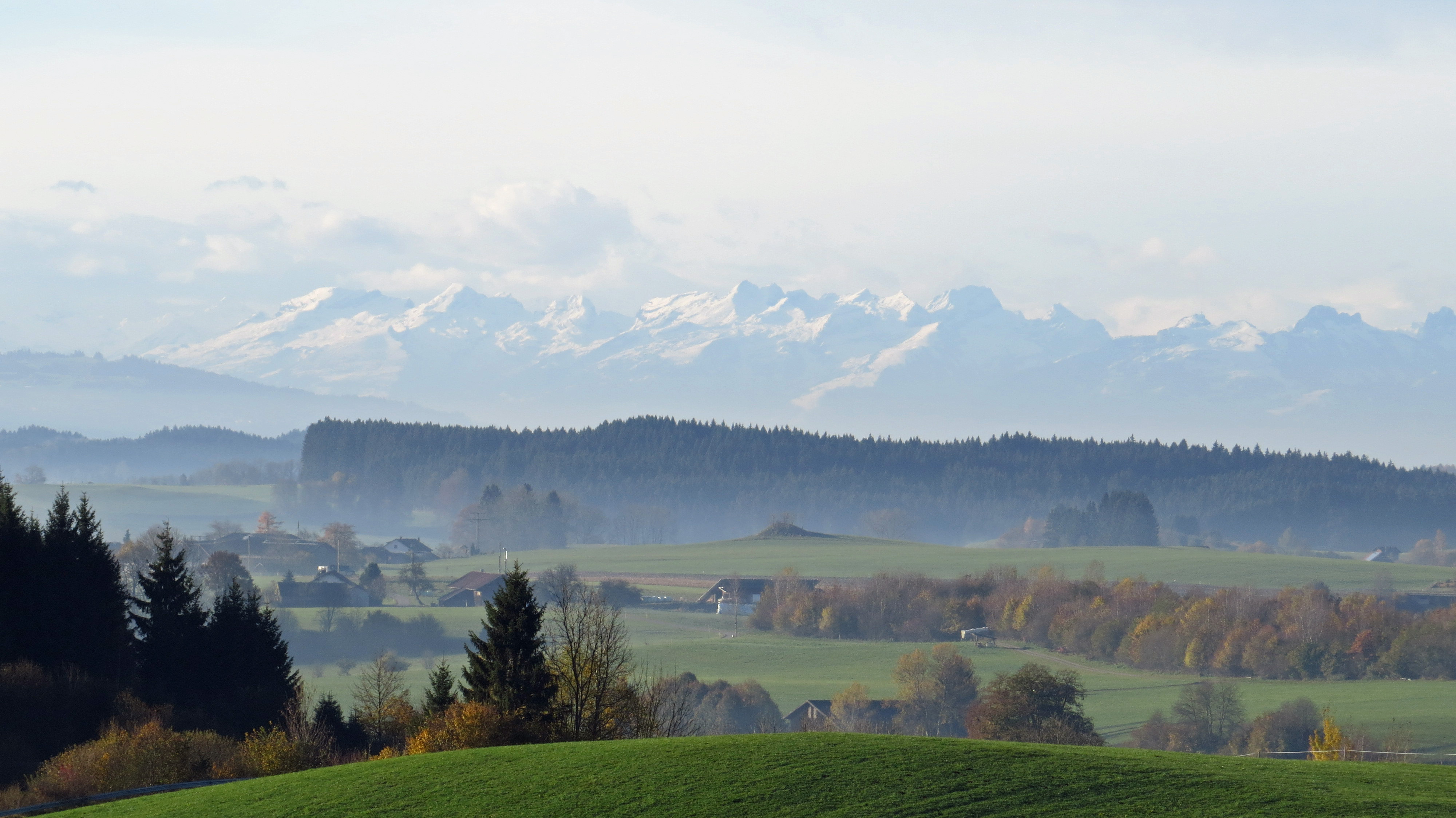 Blick vom Winterberg bei Tautenhofen zu den Glarner Alpen, Leutkirch im Allgäu